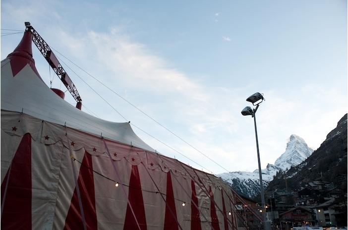 Zelt, Zermatt Unplugged